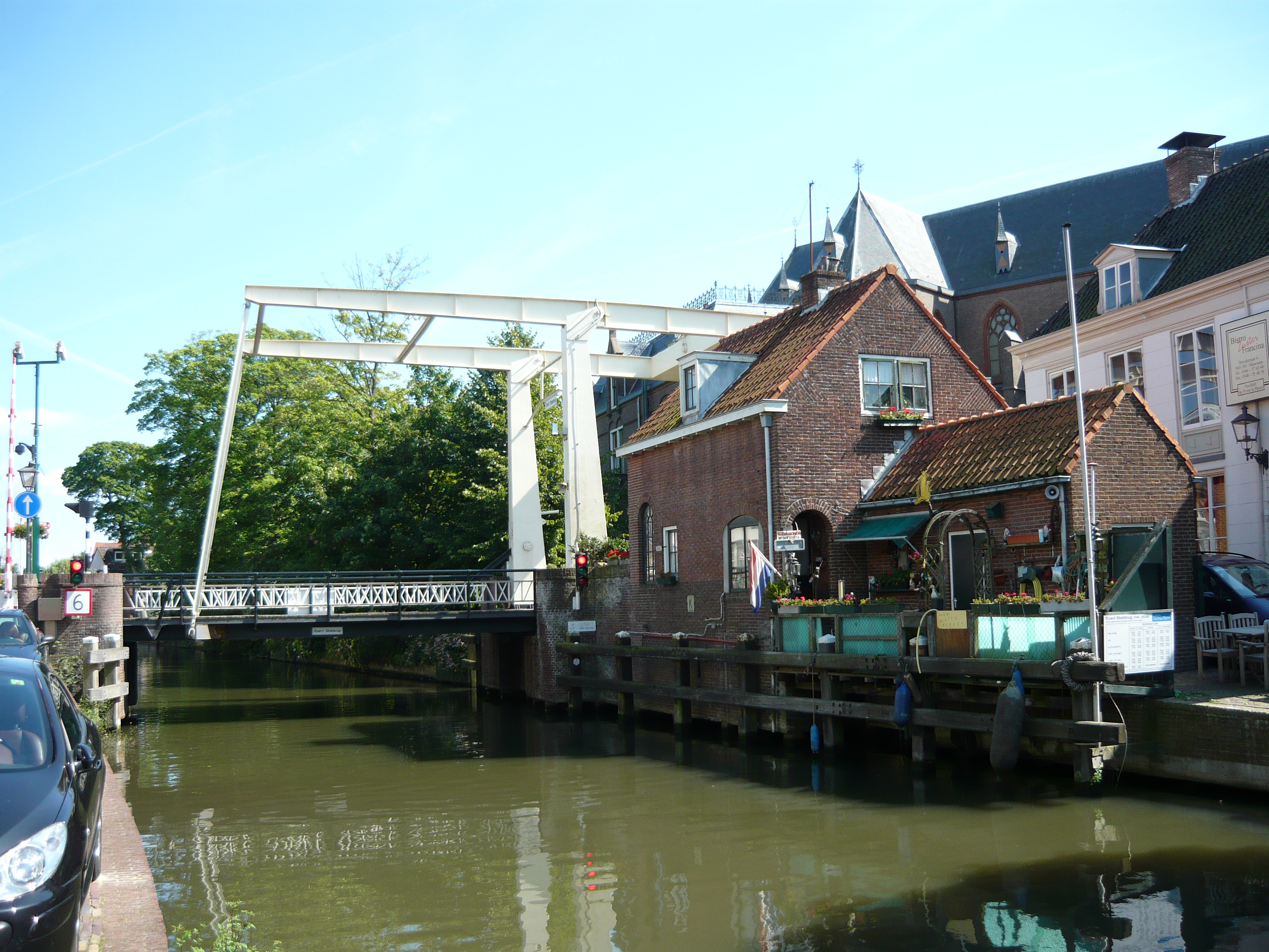 De Evert Stokbrug, in de volksmond ook wel onder meer Kaatsbaanbrug genoemd, is een brug over de rivier de Vecht in het Nederlandse dorp Maarssen. Direct ernaast staat een uit 1936 daterende dienstwoning.